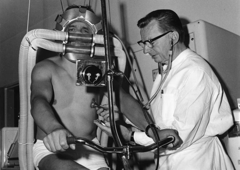 Institut für Leistungsmedizin, präventive und rehabilitive Sportmedizin in Berlin. Prof. Dr. Mellerowicz, der Leiter des Instituts, führt ergometrische und spirometrische Leistungsmessungen bei Herz- und Kreislaufuntersuchungen an einem jungen Sportler durch.